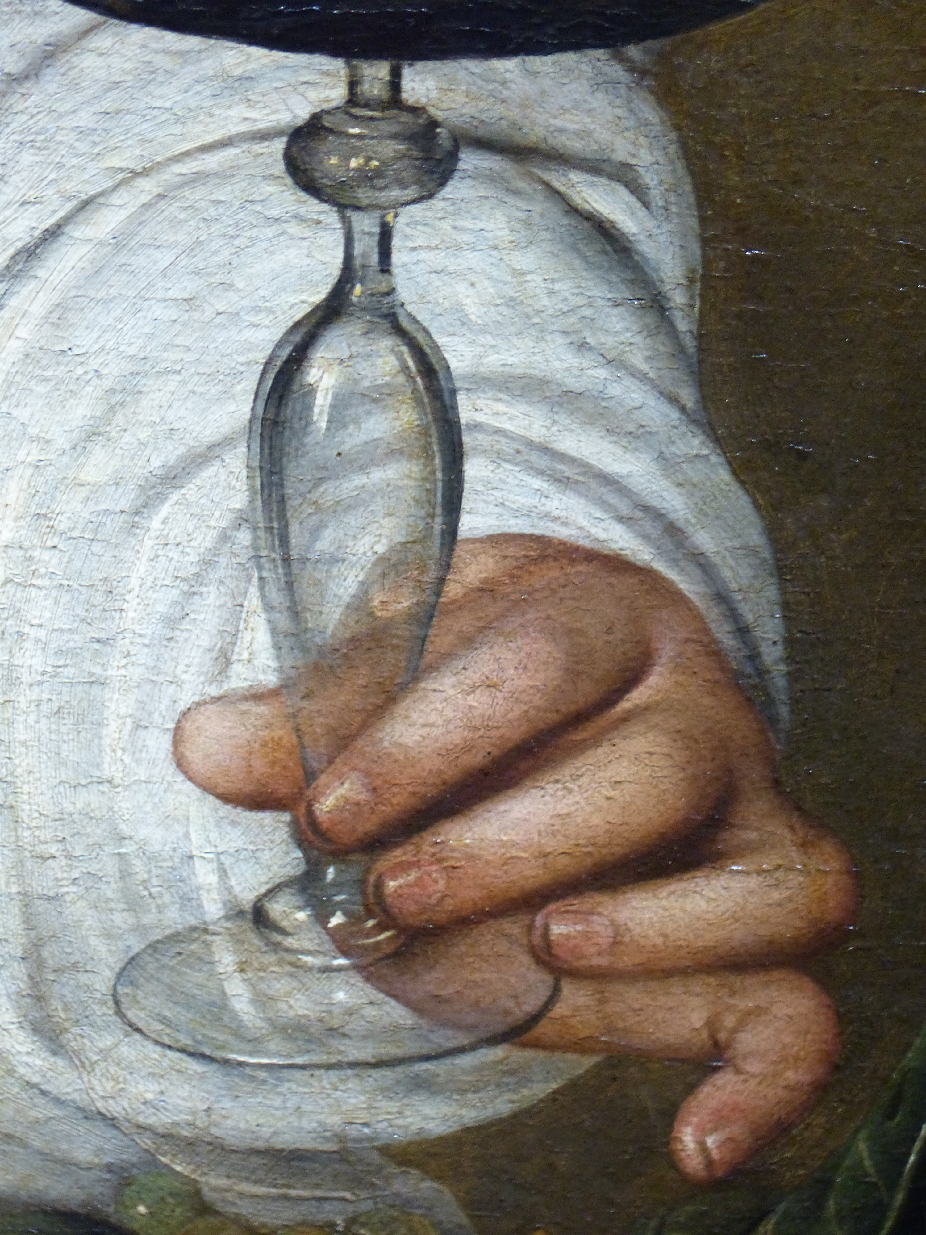 Baco de Caravaggio, detalle, Florencia, Italia, 2019